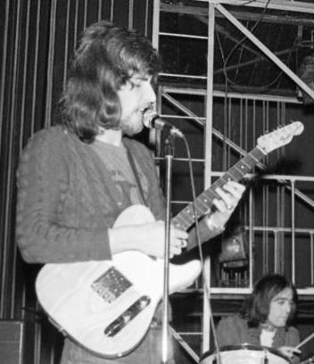 Barta Tamás az LGT együttes zenésze, énekese, zeneszerzője.